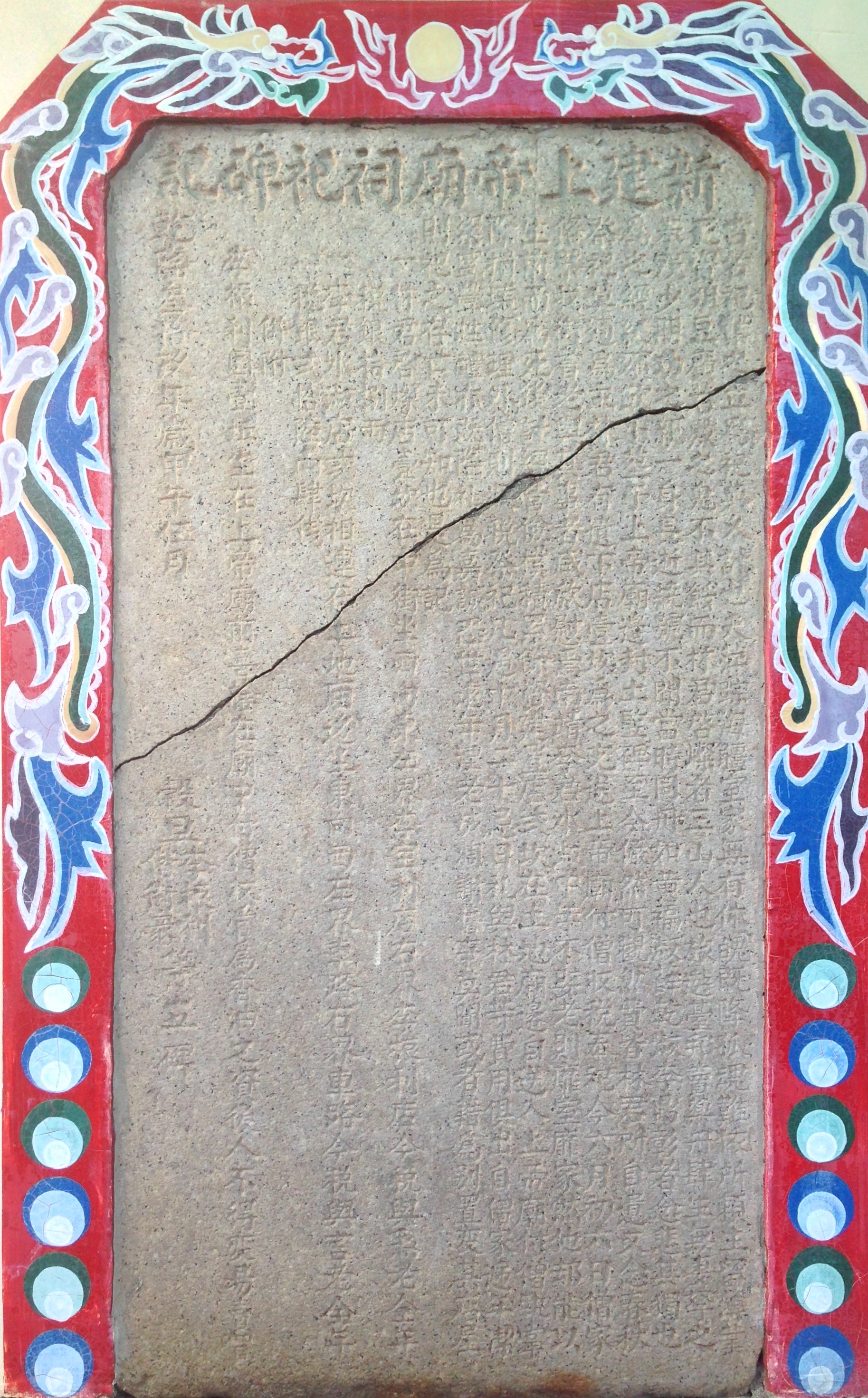 保留於萬泉寺的新建上帝廟祠祀碑記。